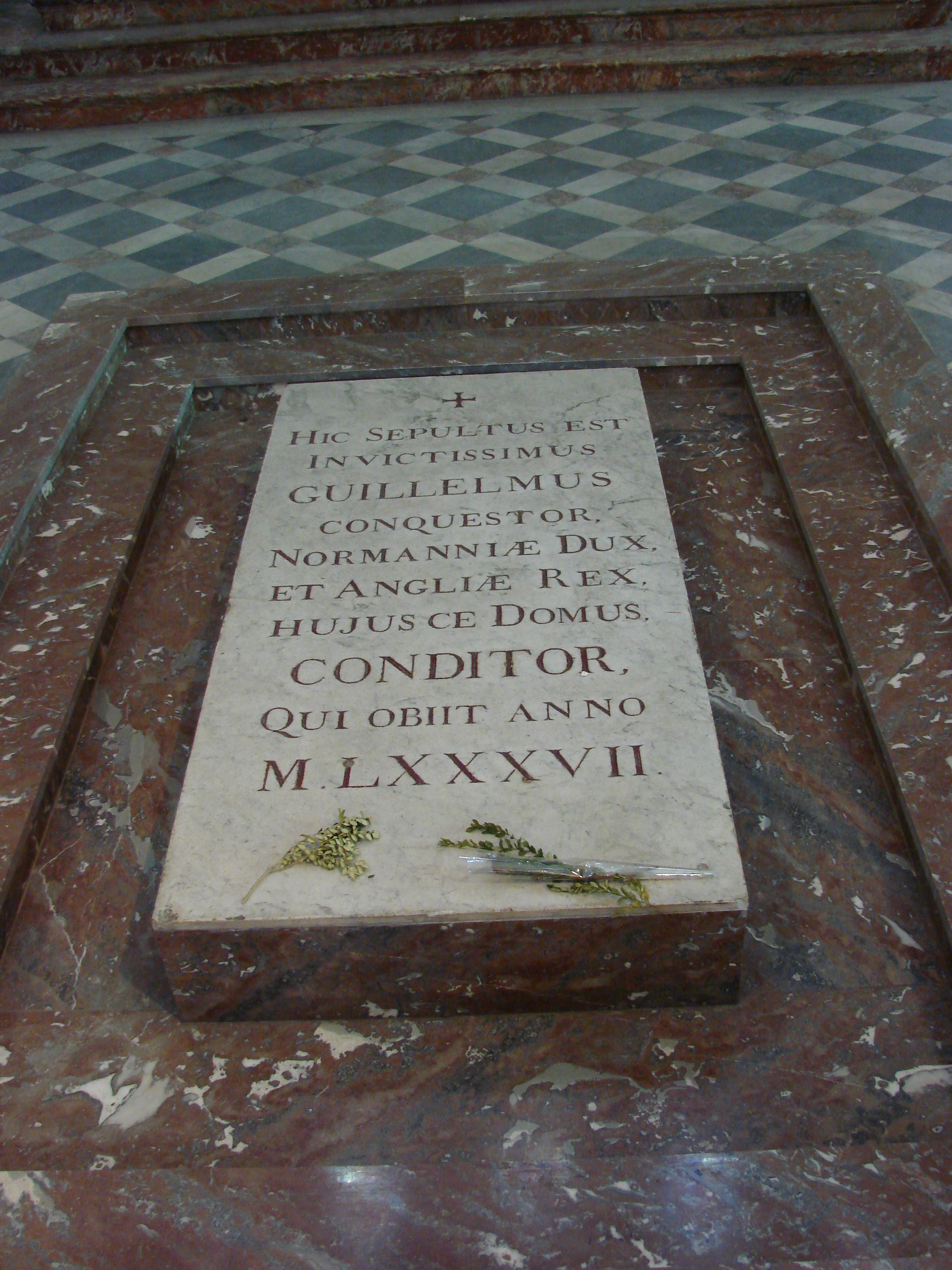 2007-07-28 08-04 Paris, Normandie 0594 Caen, Abbatiale Saint-Etienne